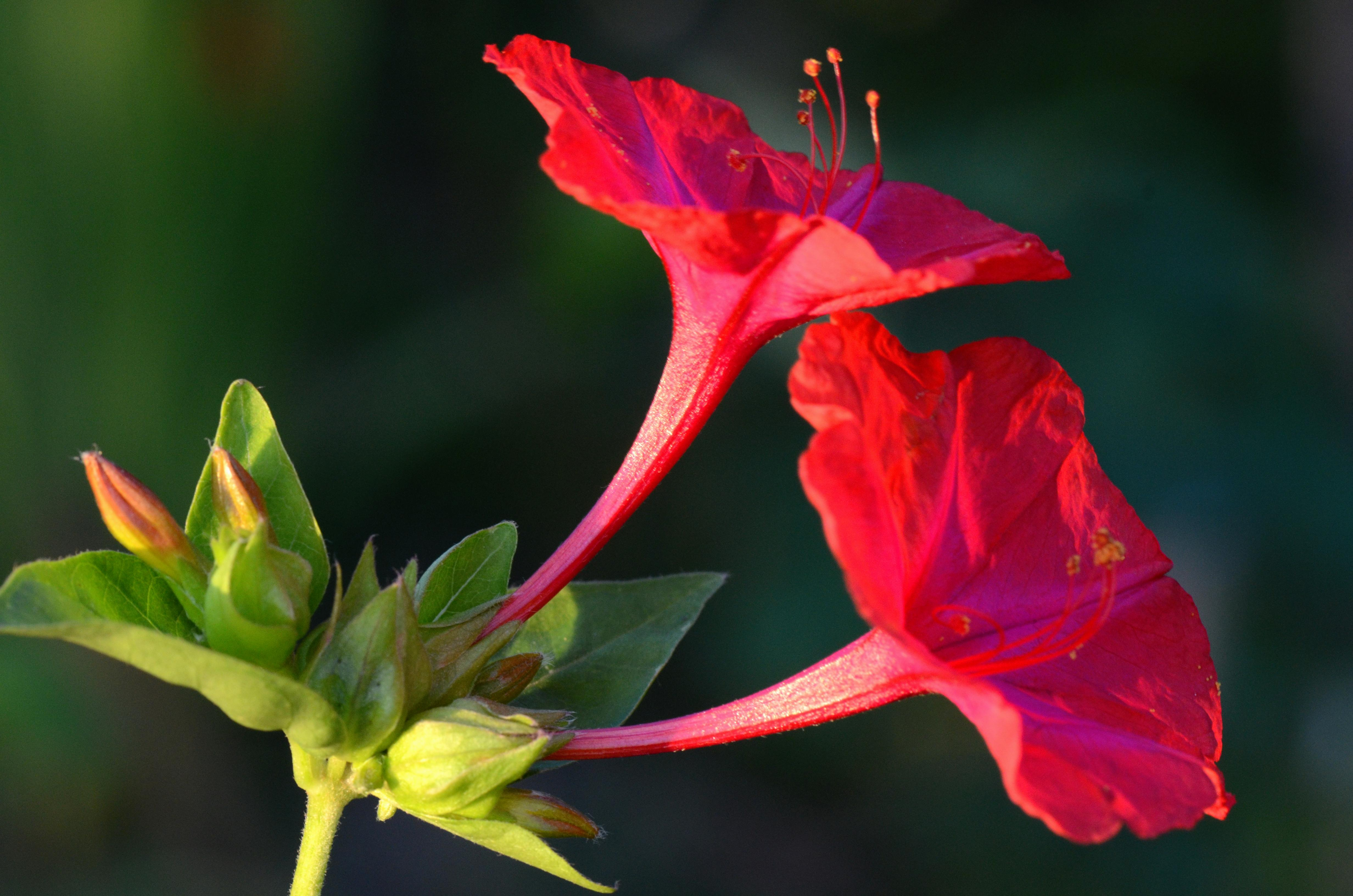 Mirabilis jalapa, Boutiers st Trojan, France